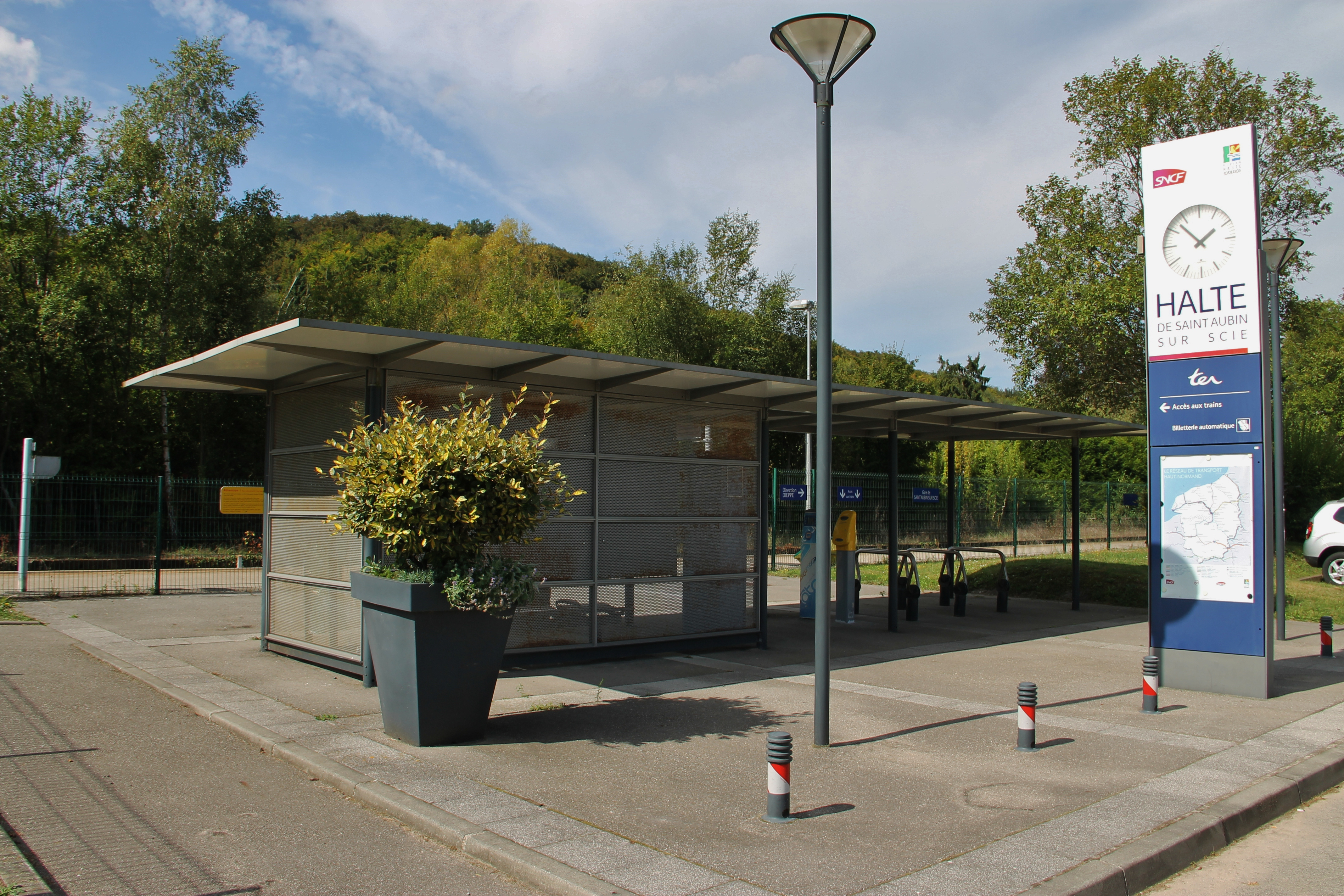 Halte de Saint-Aubin-sur-Scie en septembre 2016